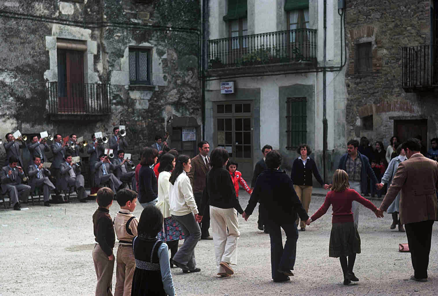 Ballada de Sardanes a Sant Jordi Desvalls (Gironès, Catalunya) l'any 1978